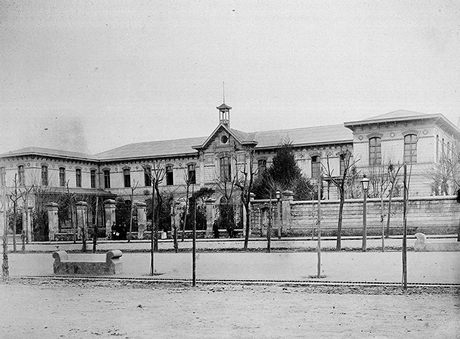 La Escuela Normal Superior José Abelardo Núñez (JAN) -fundada como Escuela de Preceptores de Santiago en 1842,​ renombrada Escuela Normal José Abelardo Núñez-, fue la primera institución formadora de maestros habilitados para desempeñarse en la docencia primaria en Chile y Latinoamérica (Educación General Básica). Su primer director fue el escritor y político argentino Domingo Faustino Sarmiento.1​ Durante un siglo formó docentes primarios, hasta que finalmente fue cerrada durante la dictadura de Pinochet, en 1974